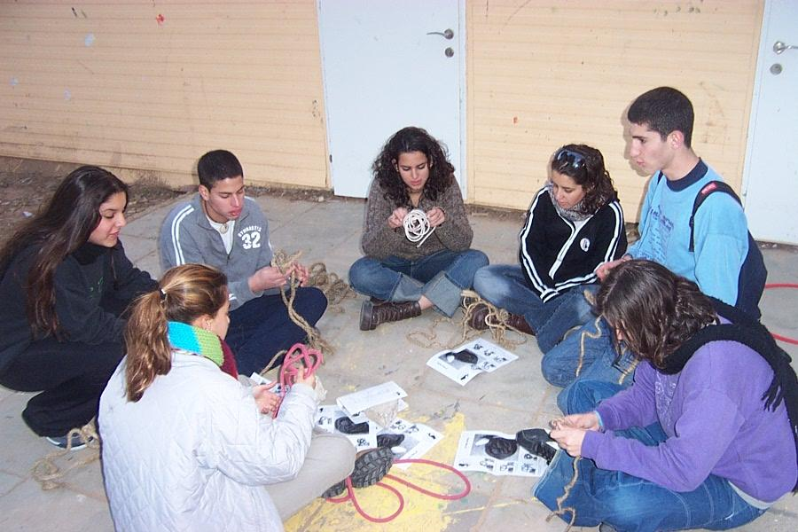 קבוצה עוברת פעולת עמלנות - מכינים פלטות מחבלים.